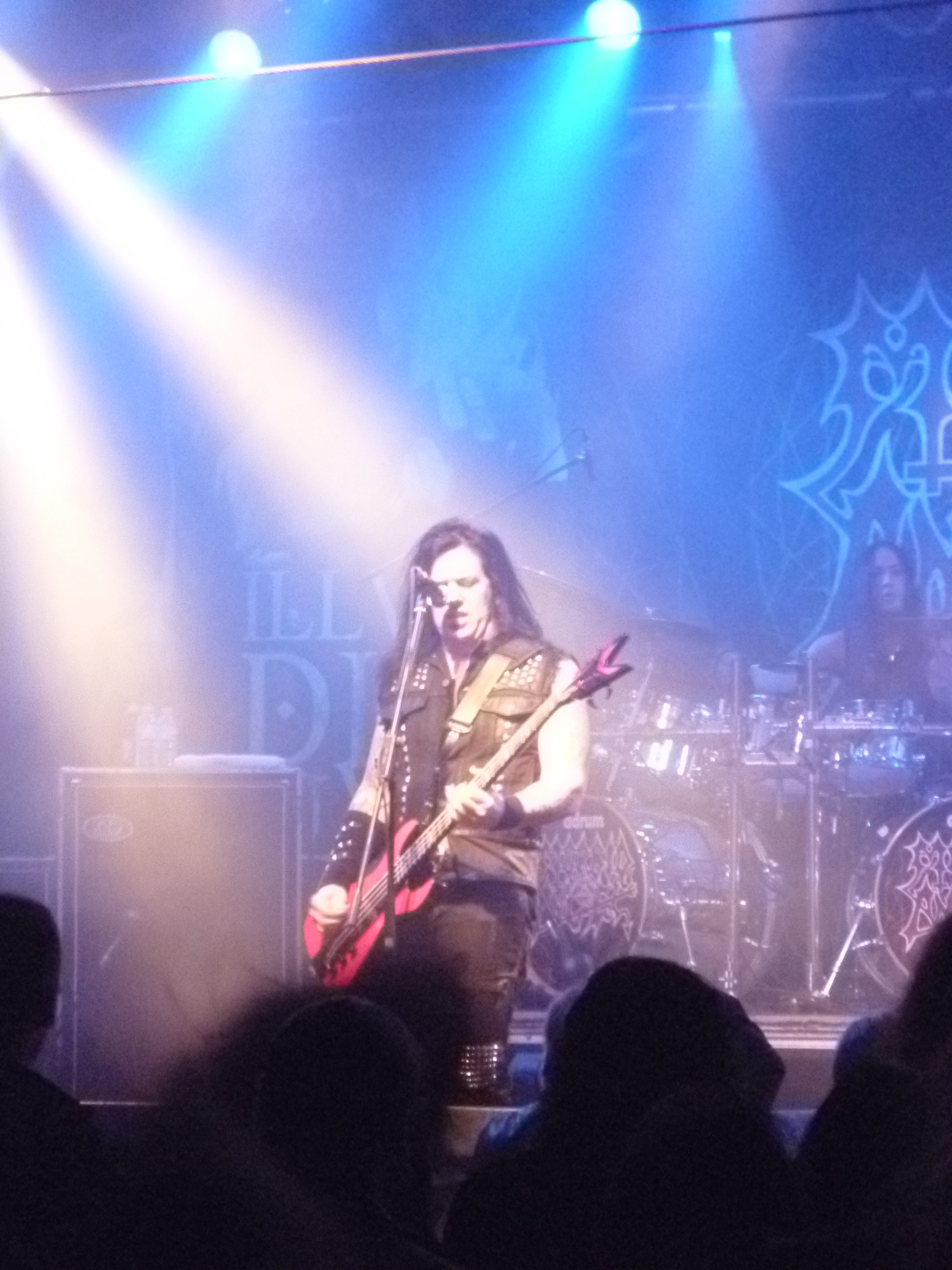 Morbid Angel live in der Garage Saarbrücken